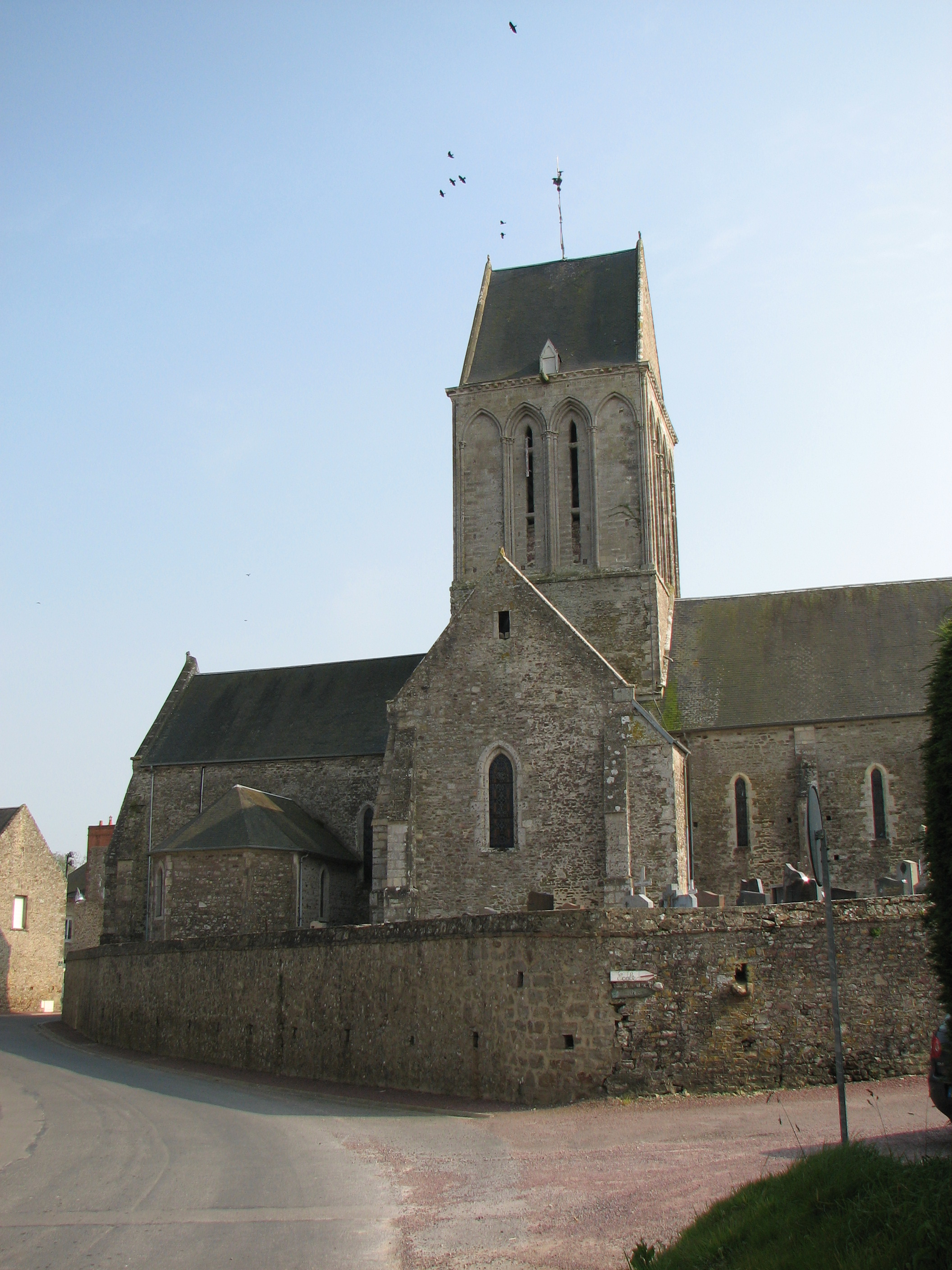 Église de Gorges, dpt de la Manche, NormandieGorges churche, Normandy